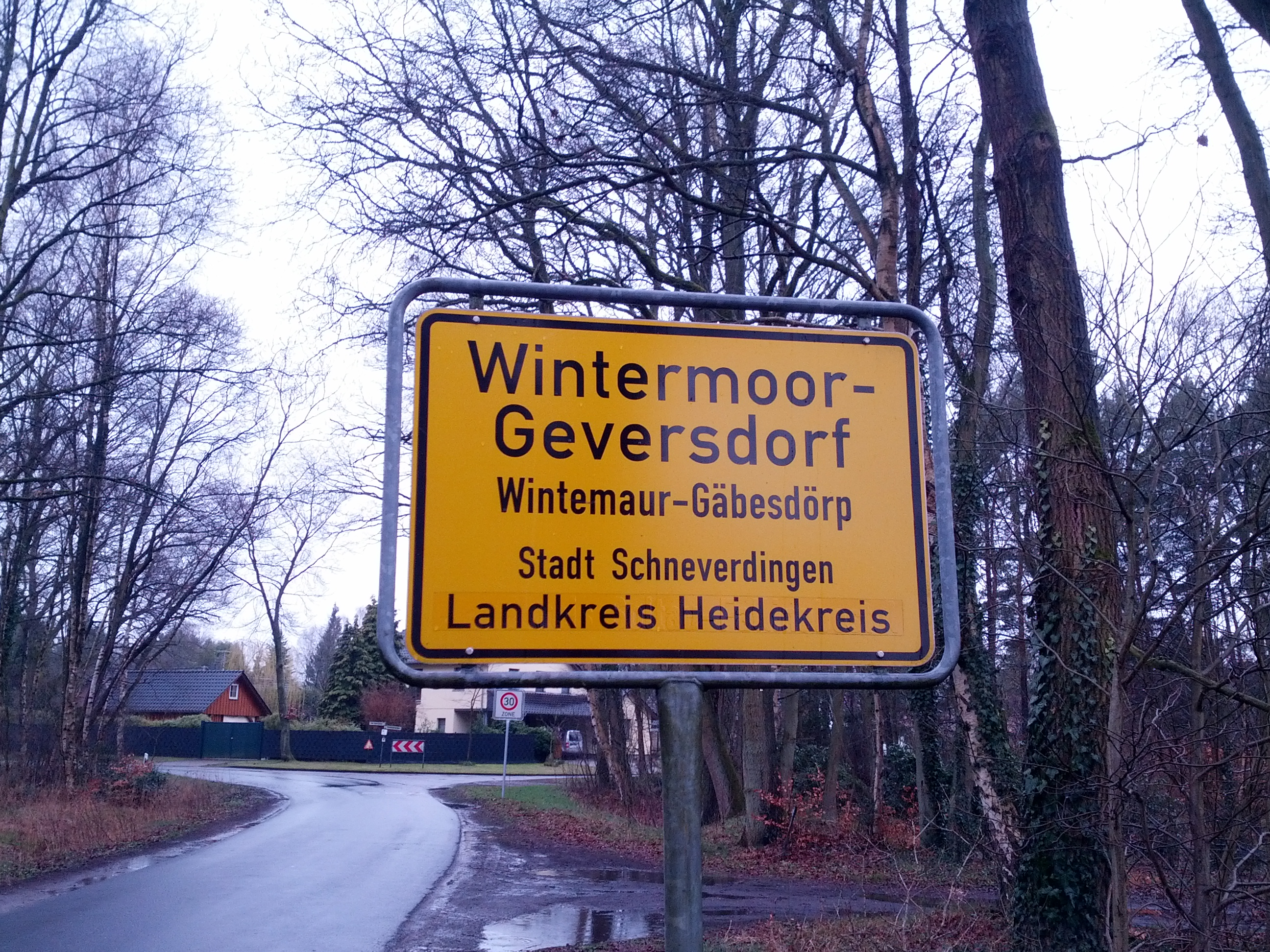 Oortsschild mit den Naam op Hoochdüütsch un op Plattdüütsch